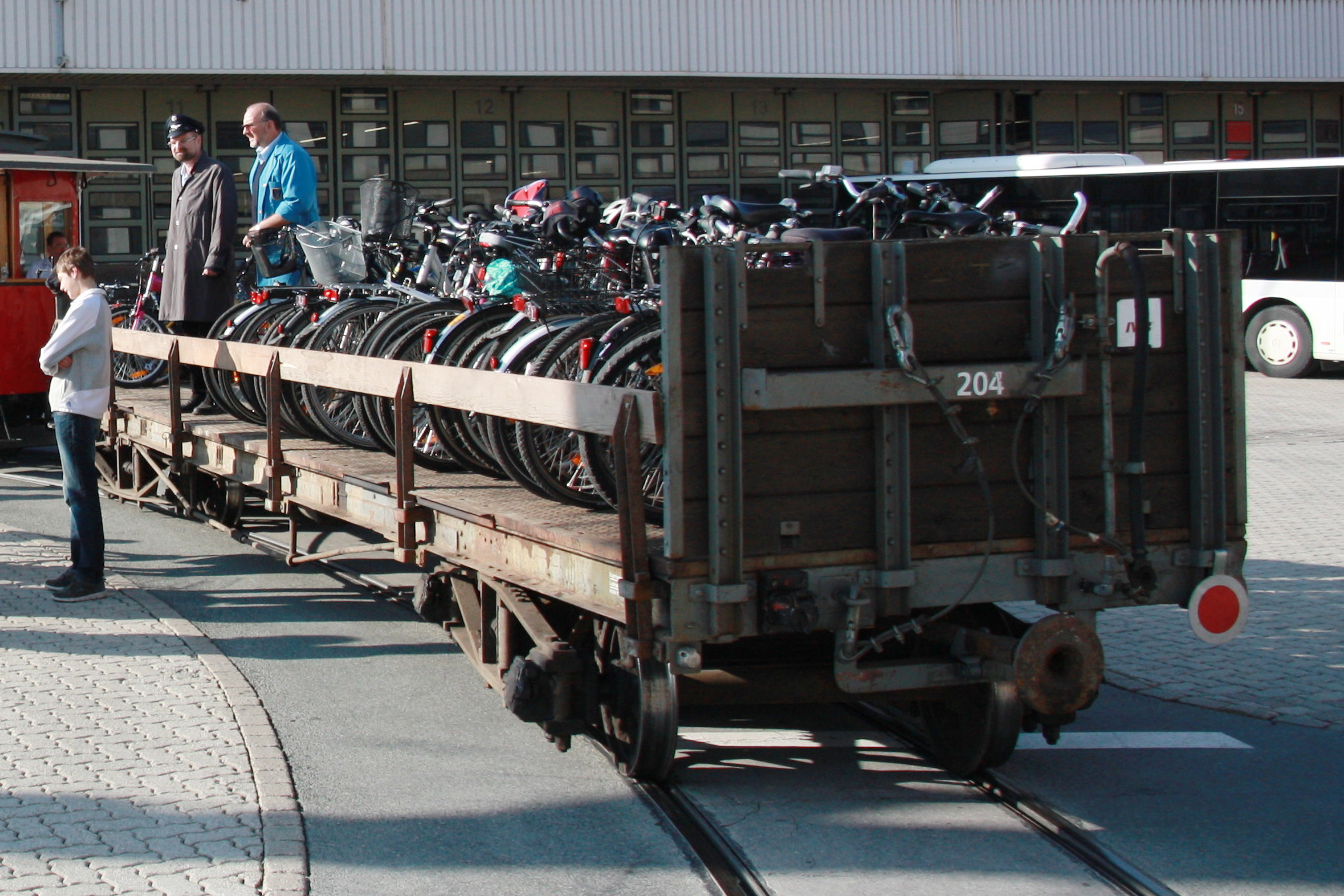 Fahrradtransport mit Niederbordlore 204